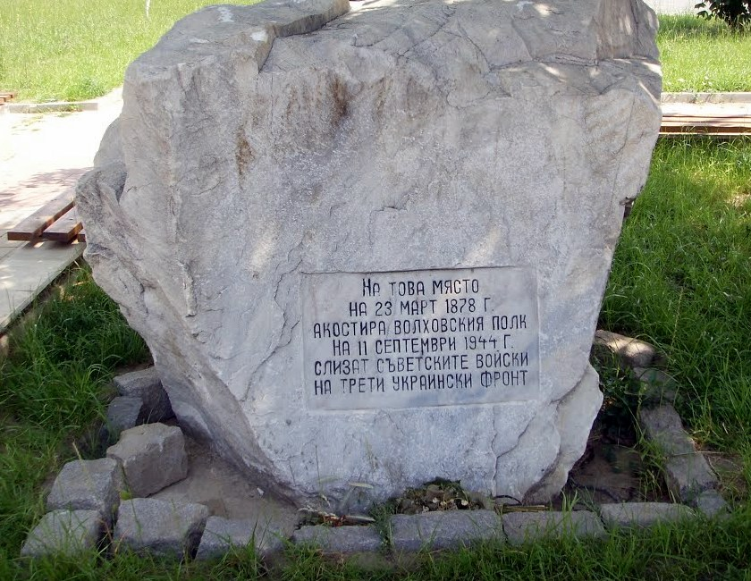 Паметник в Лом на мястото, където на 23 март 1878 г. акостира 138-ми Болховски пехотен полк и на 11-ти септември 1944 г. слизат съветските войски от Трети украински фронт.